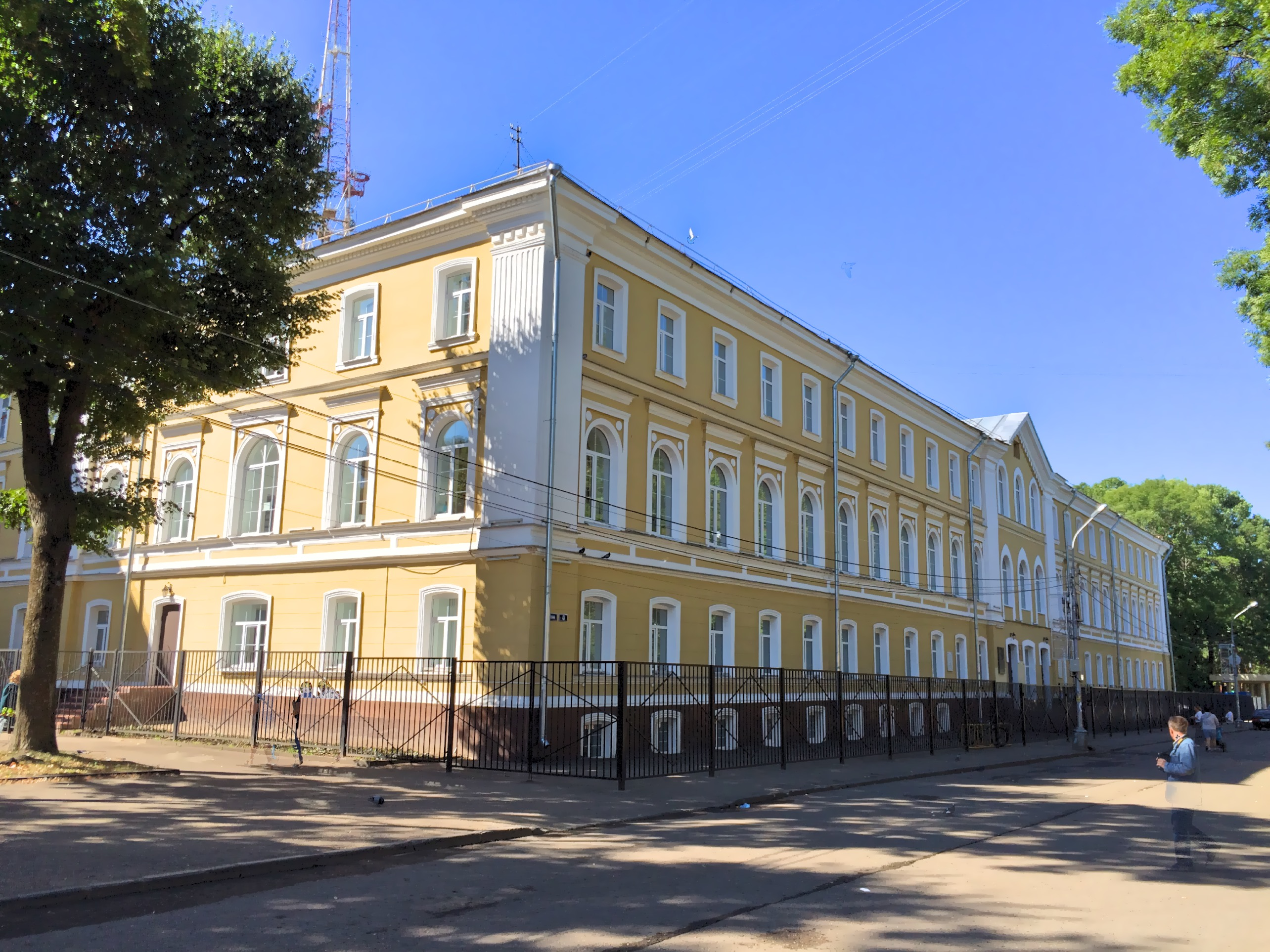 Smolensk